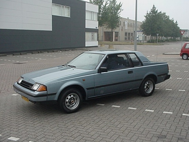 Toyota Celica TA 60 Coupé.